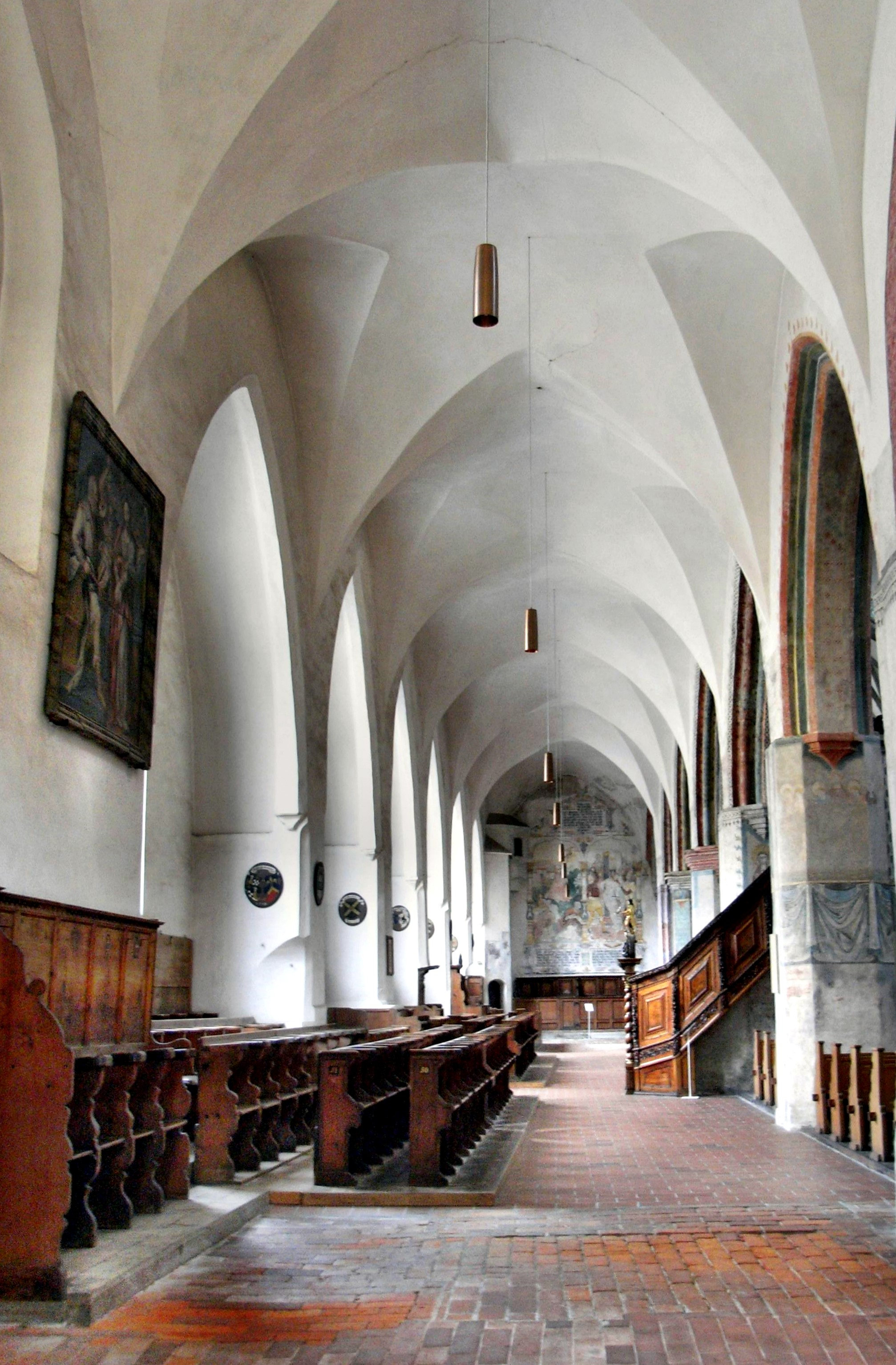 Das Nordschiff von St. Martin zu Memmingen